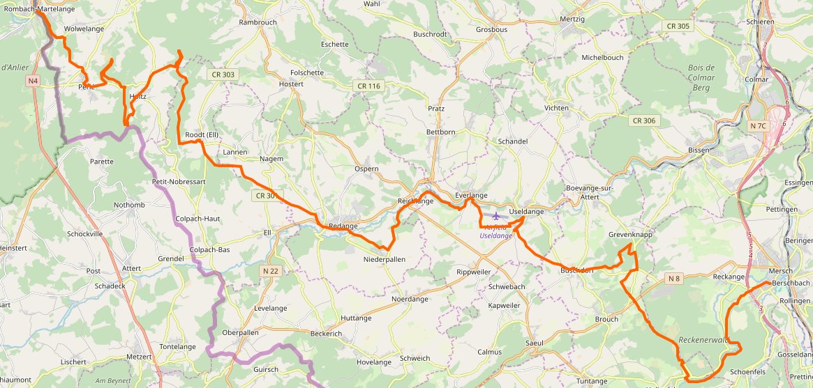 Tracé du Sentier pédestre national de l'Attert